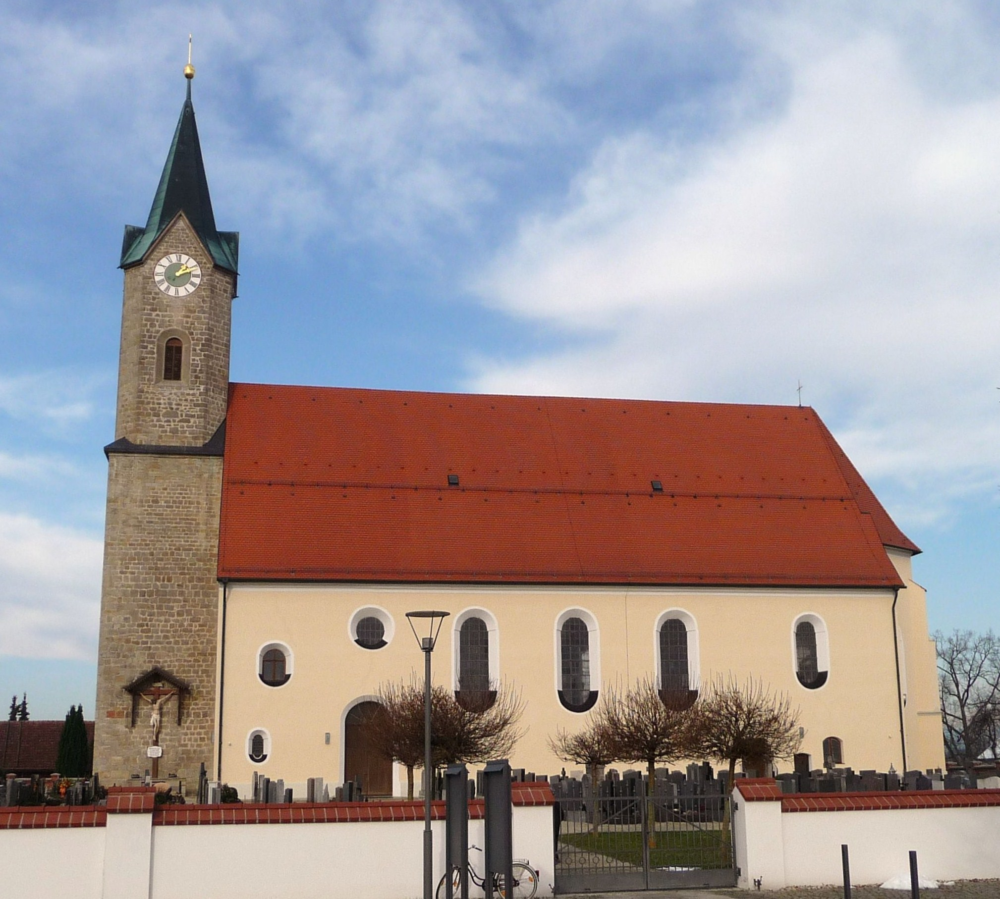 Die katholische Pfarrkirche St. Simon und Judas Thaddäus in Kurzenisarhofen, Gemeinde Moos (Niederbayern)